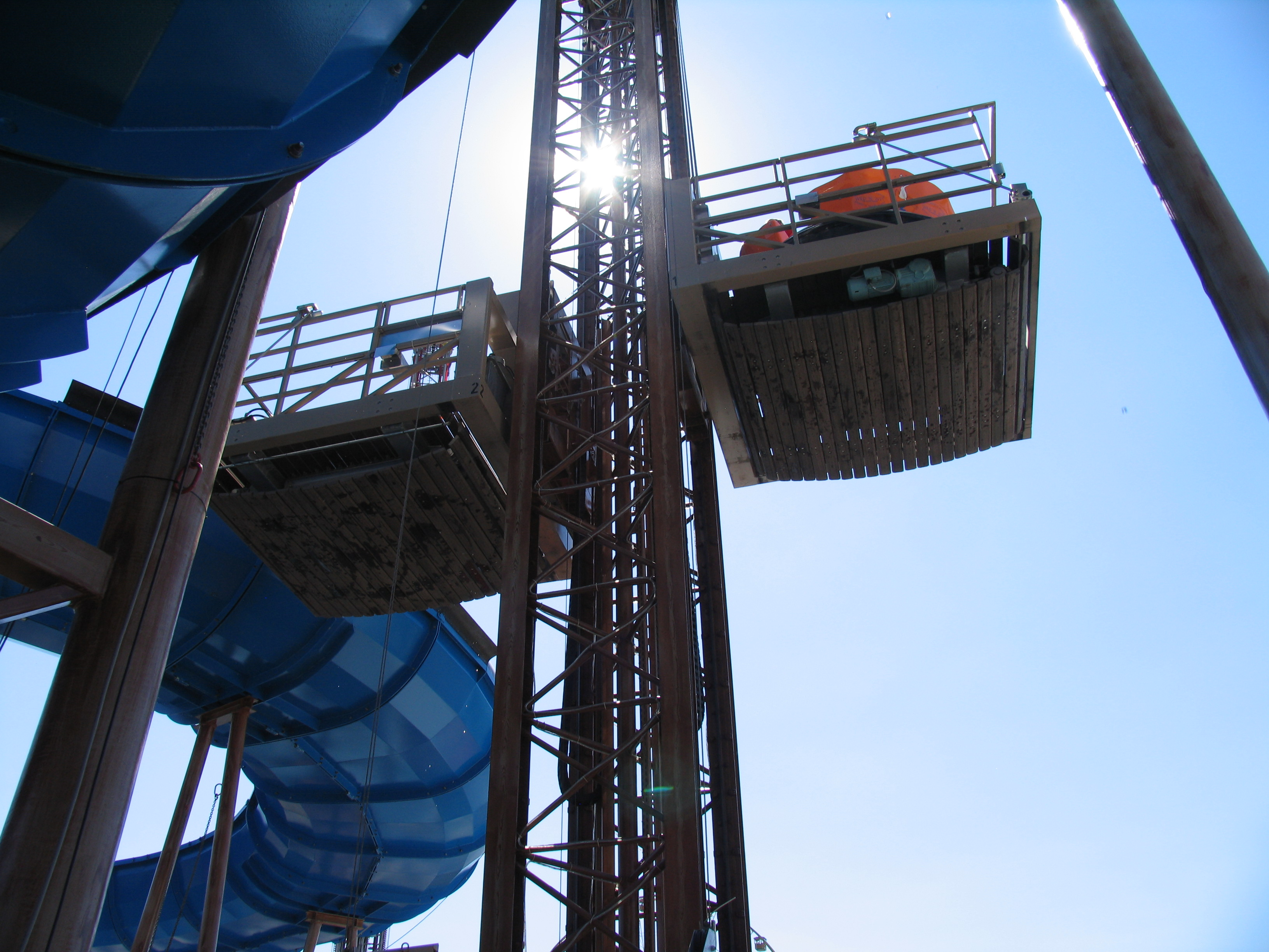 Lift of Daniel Löwenthals Spinning Rapid Wild'n'Wet